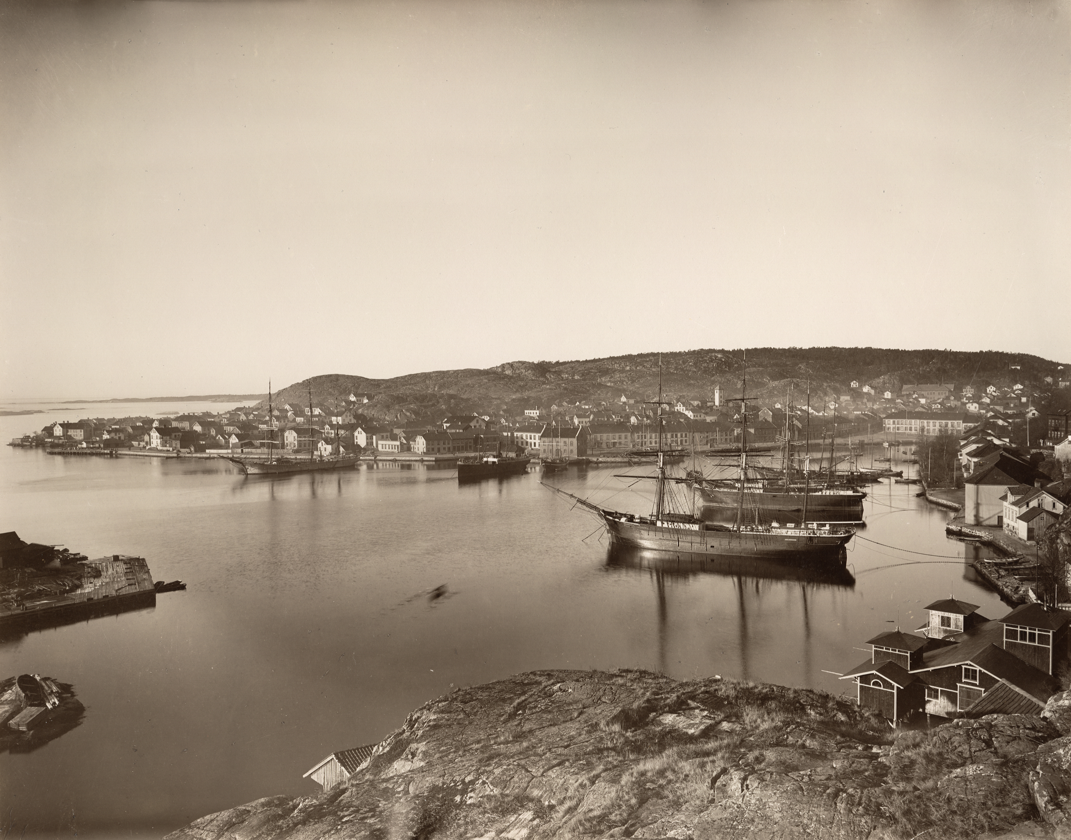 Risør i Risør, Aust-Agder Eneret 1899